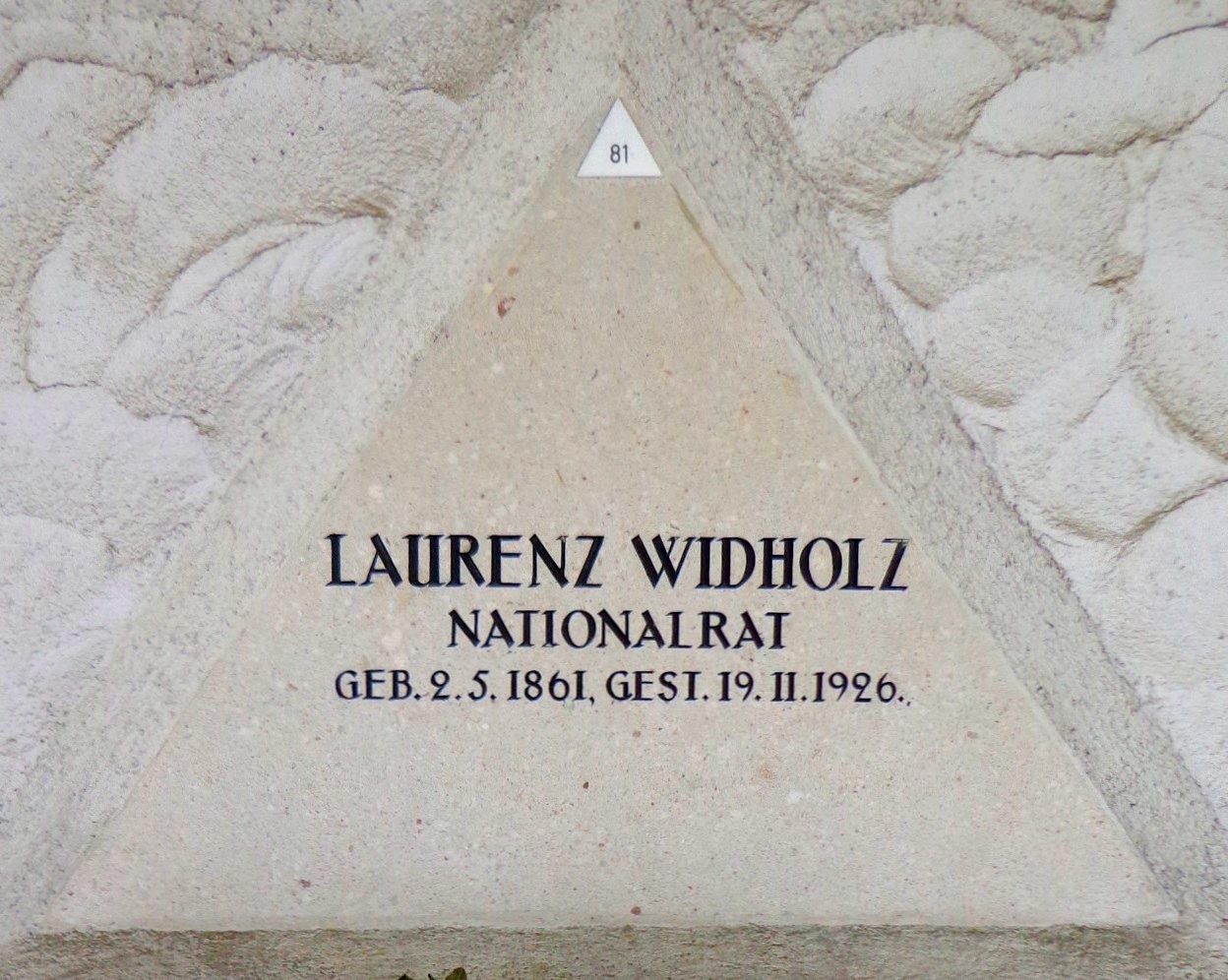 Feuerhalle Simmering - Arkadenhof (Abteilung ALI) - Laurenz Widholz